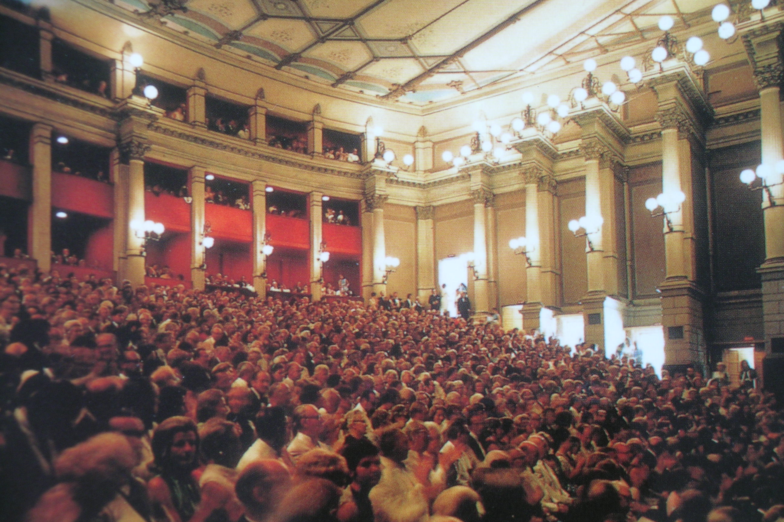 Festspielhaus Bayreuth Innen